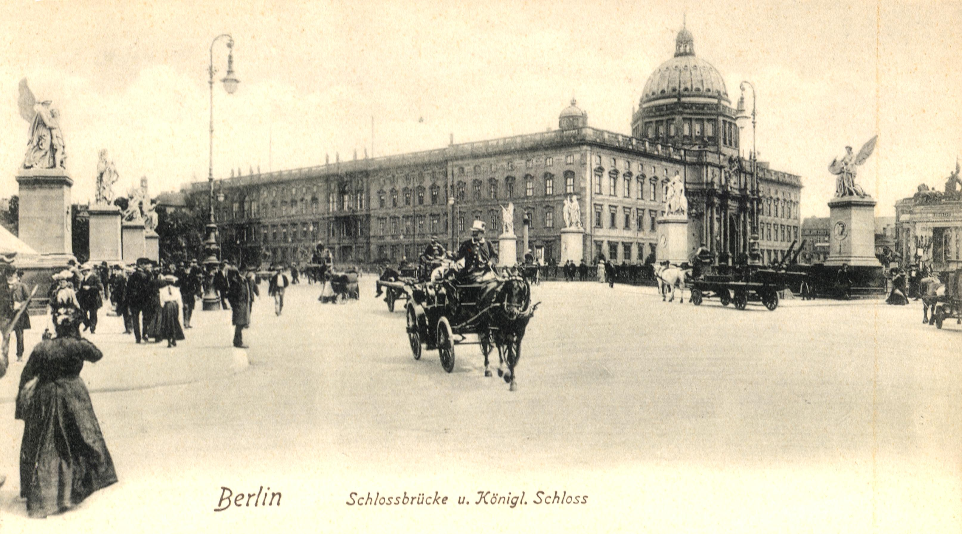 Berlin, Palace Bridge (Schlossbrücke), 1900